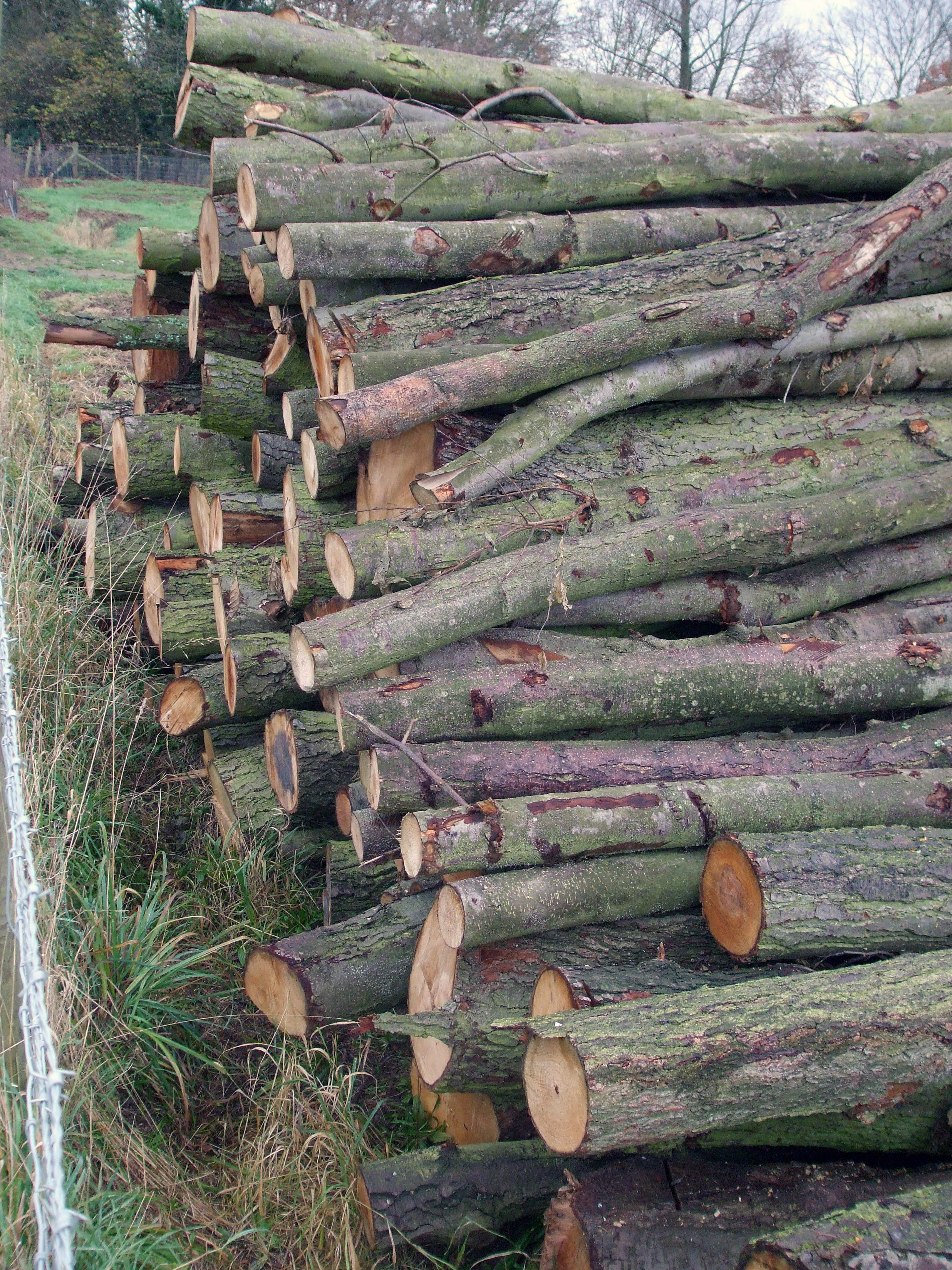 Edesfield,Reigate,Nov 2007